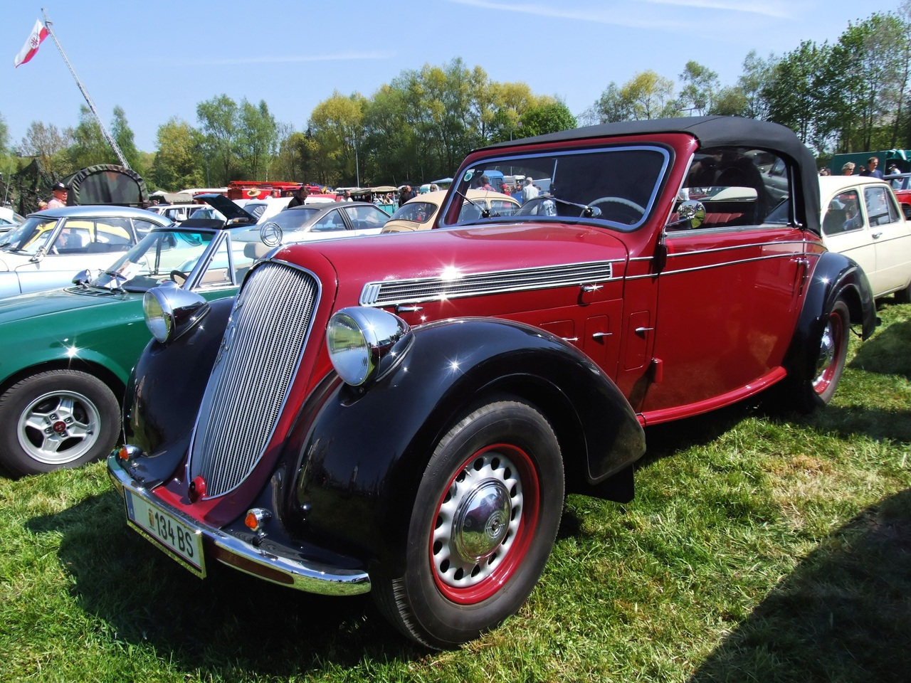 Quelle: selbst fotografiert, 04/2007 Fotograf: Späth Chr.